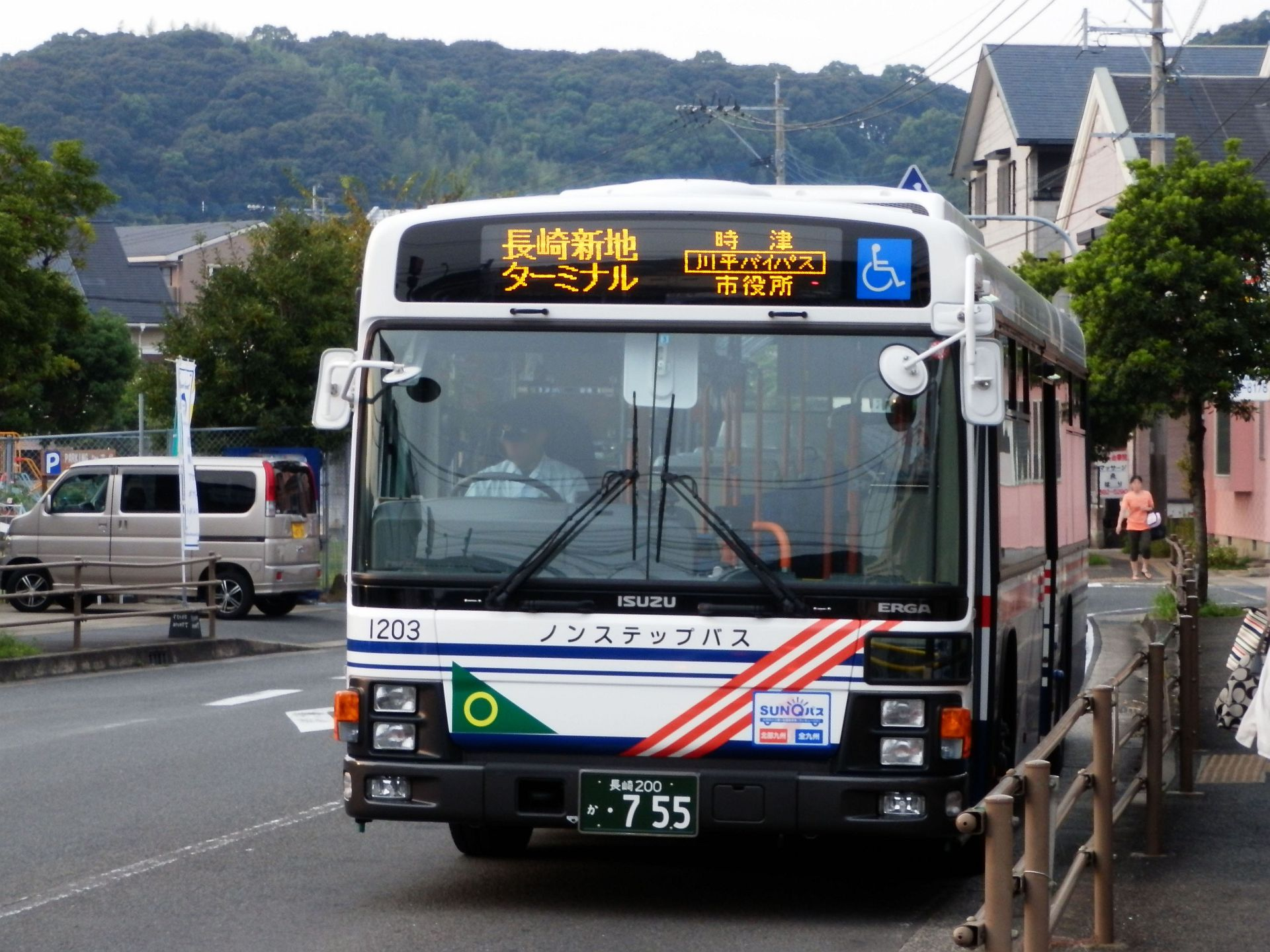 長崎バス溝川バス停